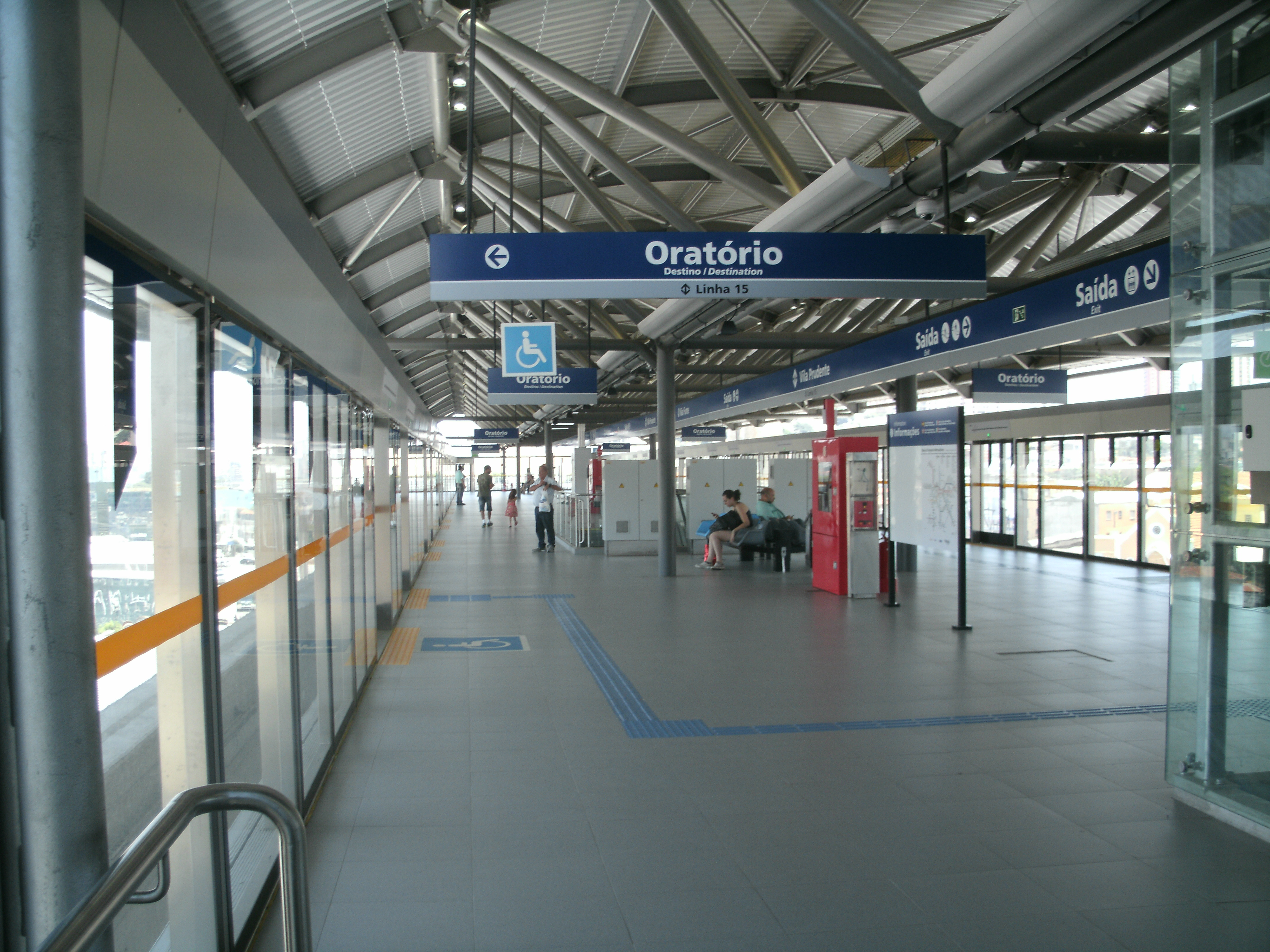 Monotrilho da Linha 15-Prata (Estação Vila Prudente)